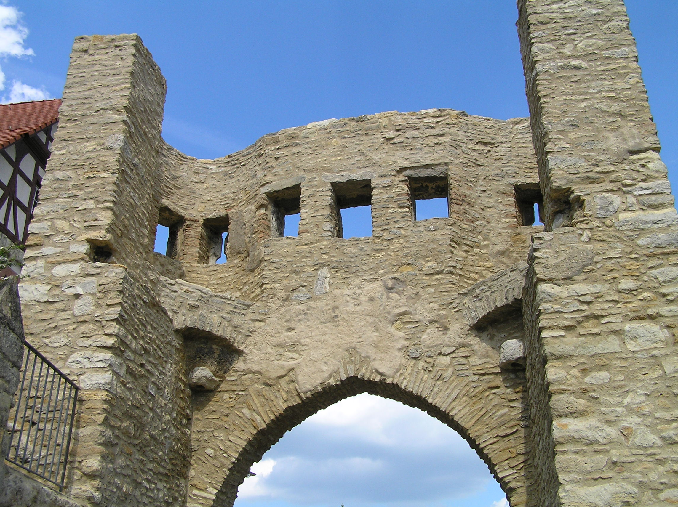 Uffhubor Westansicht Mai 2010